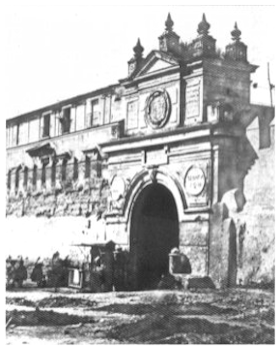 Puerta de la Carne. Calotipo a la cera.